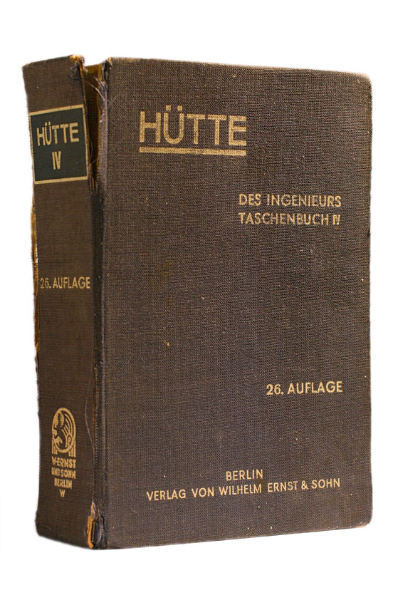 Abbildung "Des Ingenieurs Taschenbuch" vom Verlag Hütte aus dem Jahr 1938.